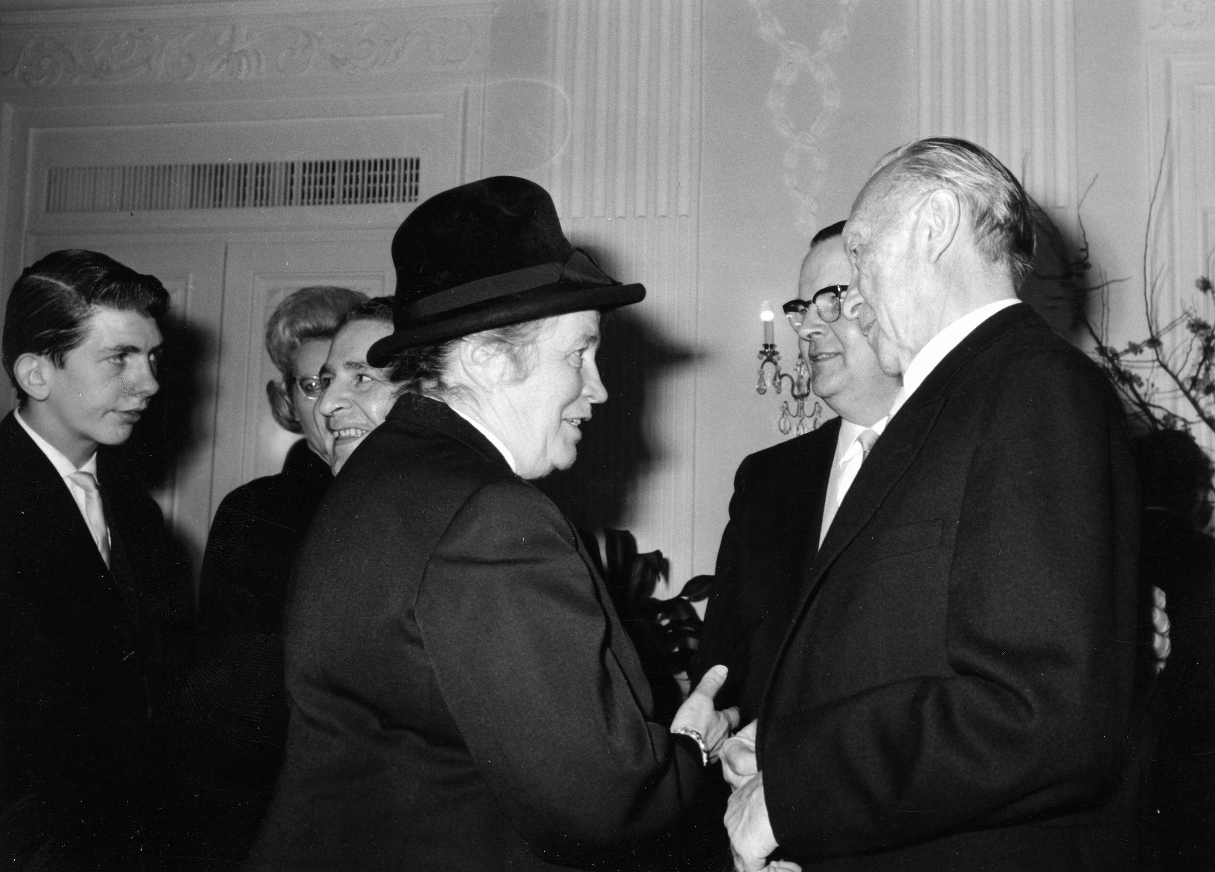 Adenauer, KonradFeier zum 88. Geburtstag in der Redoute, 05.01.1964